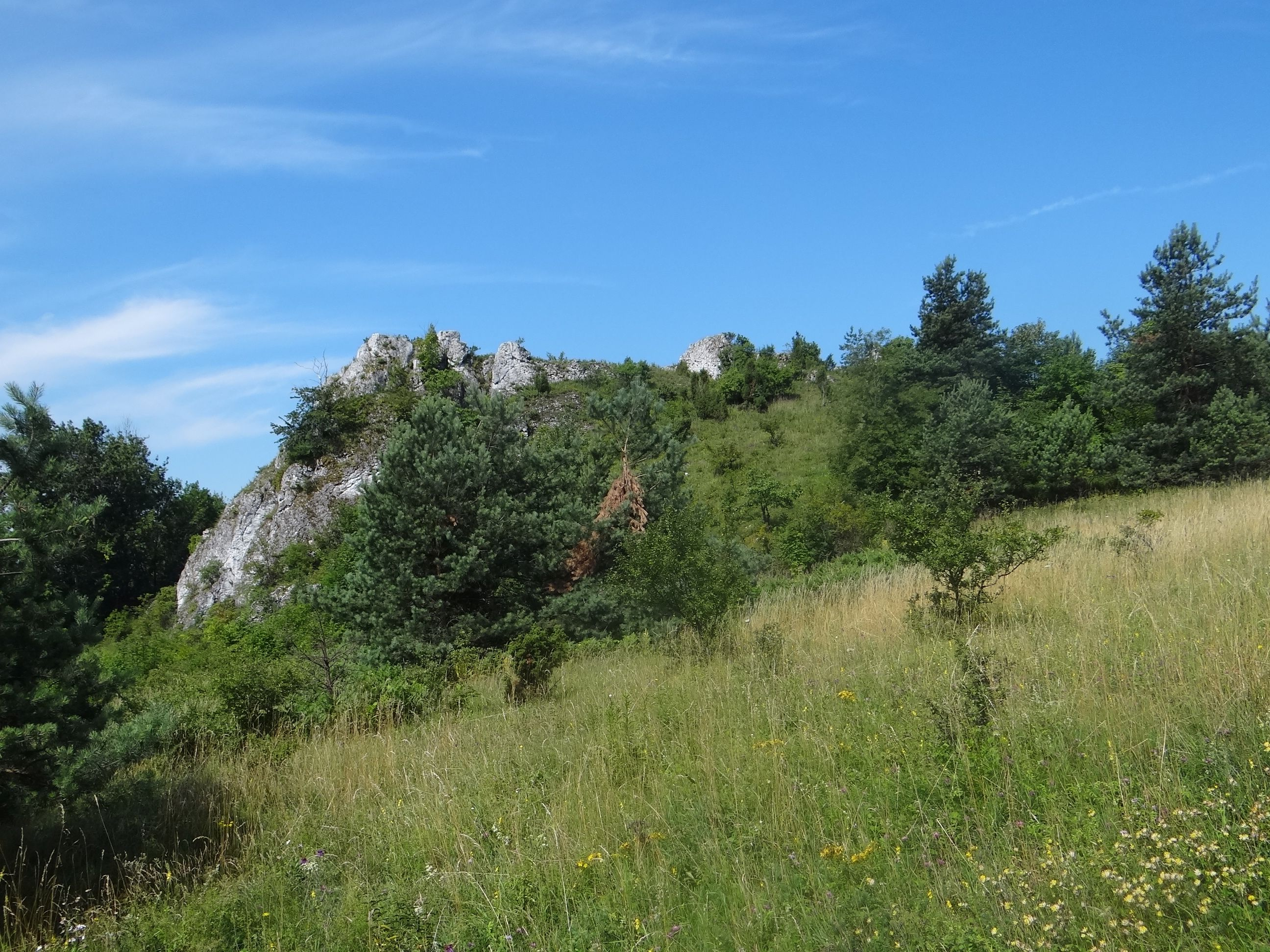 Wzgórze Łysa Pałka w Ryczowie